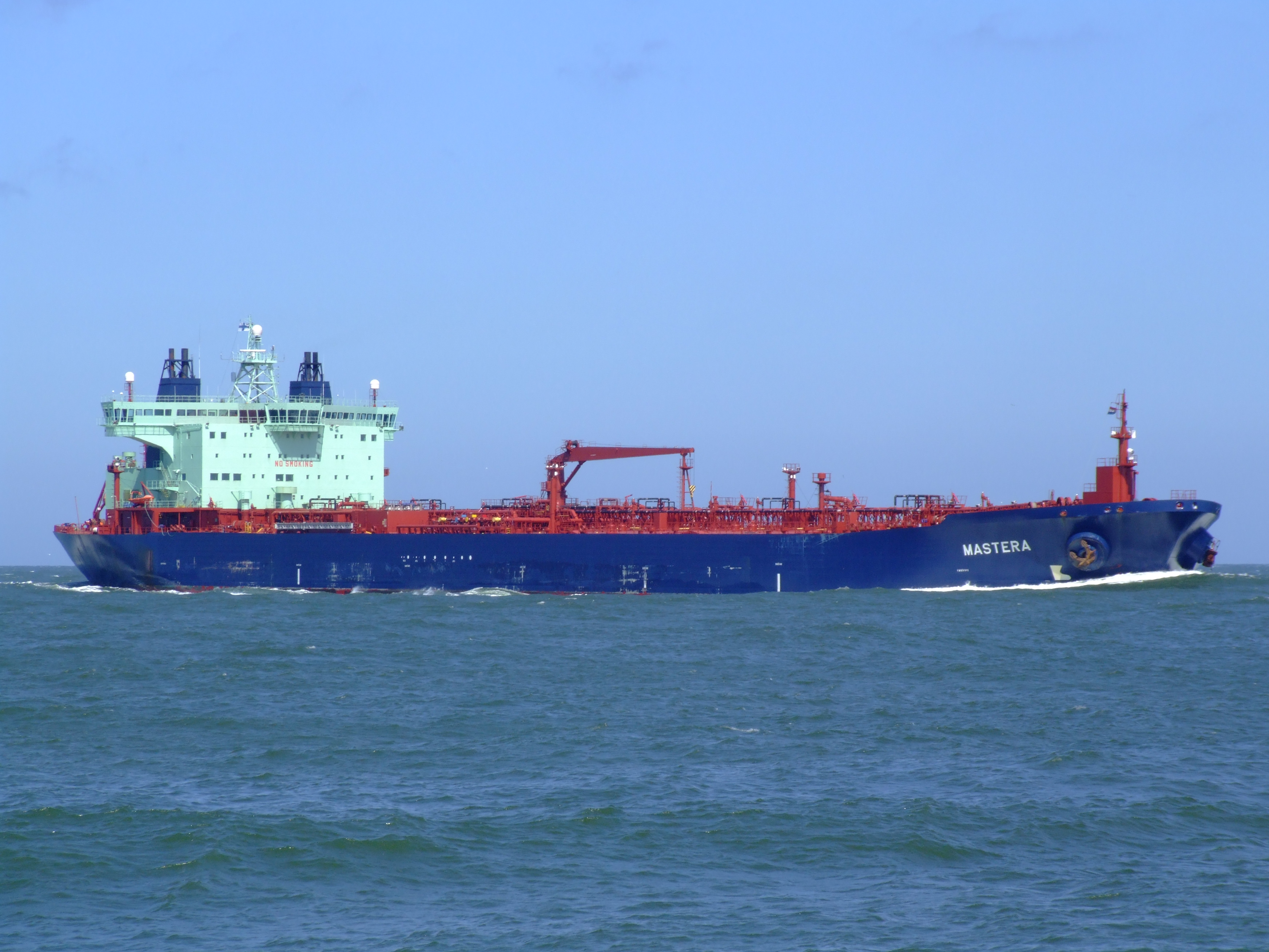 MT Mastera